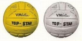 balon mundial 1958